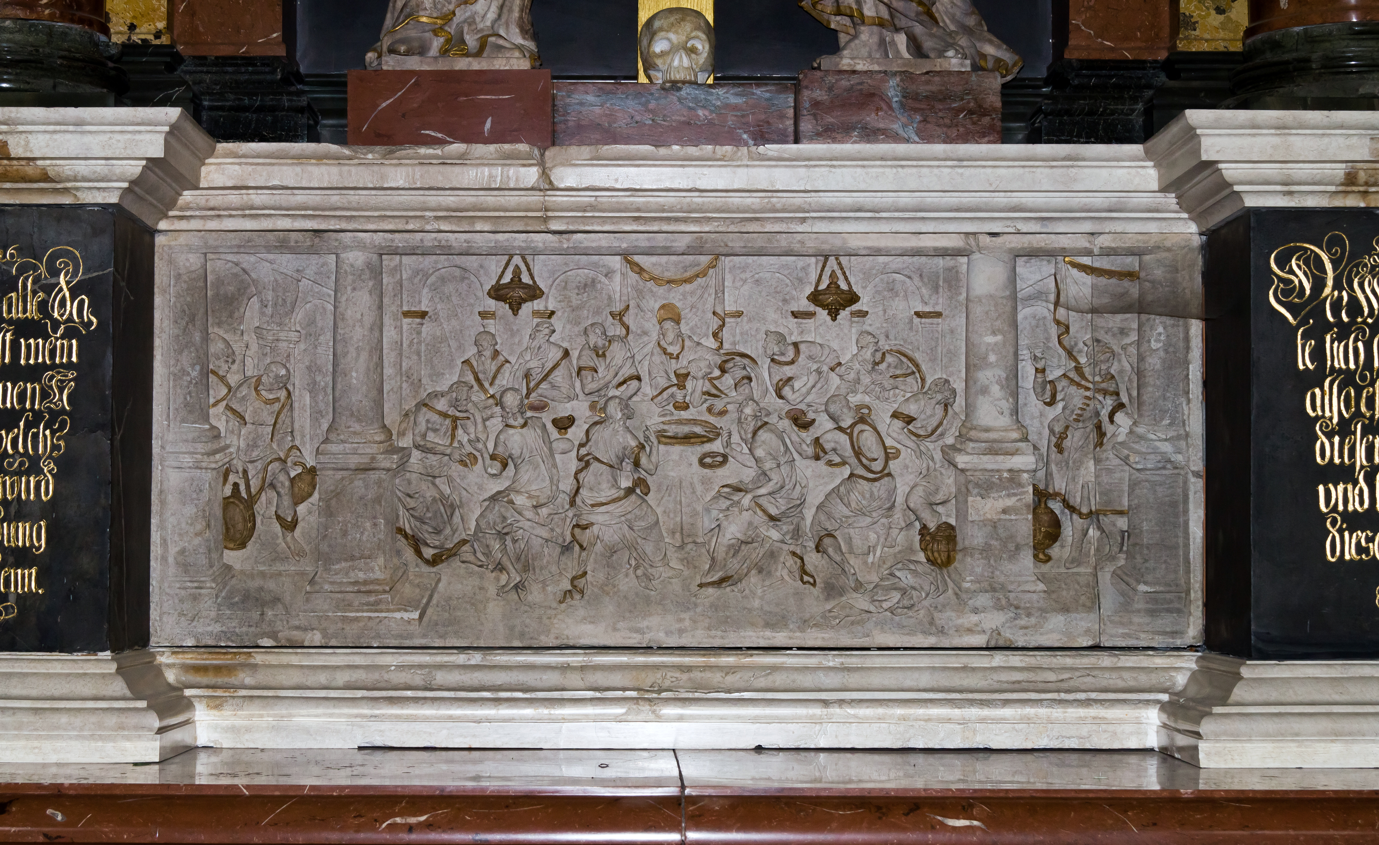 Nosseni-Altar Abendmahl-Relief